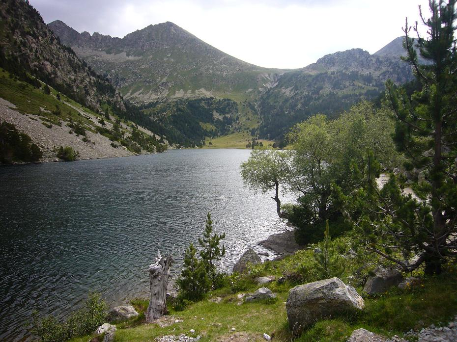 Estany Llong; la Vall de Boí, Alta Ribagorça, Catalunya